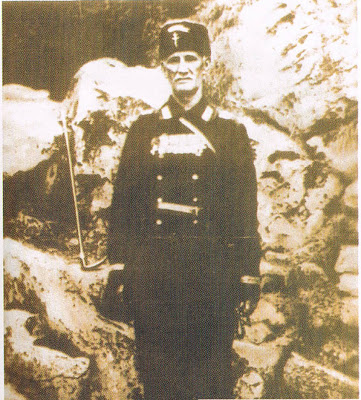 Георги Темелков